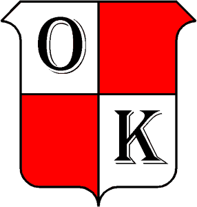 Escudo de la Escuela Técnica Nº1 "Otto Krause", Monserrat, Capital Federal, Argentina